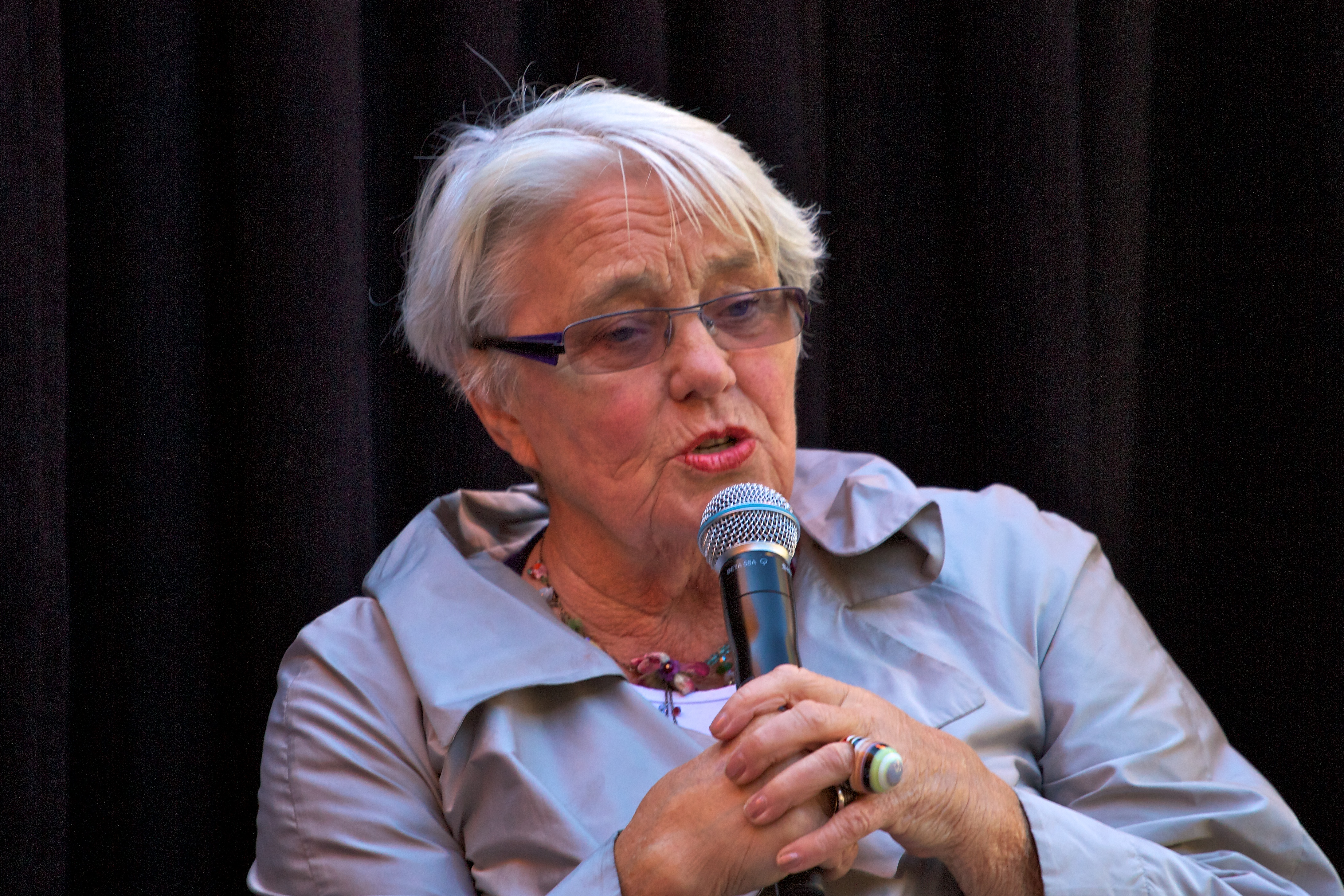 Ingeborg Moræus Hanssen på Oslo bokfestival 2010.